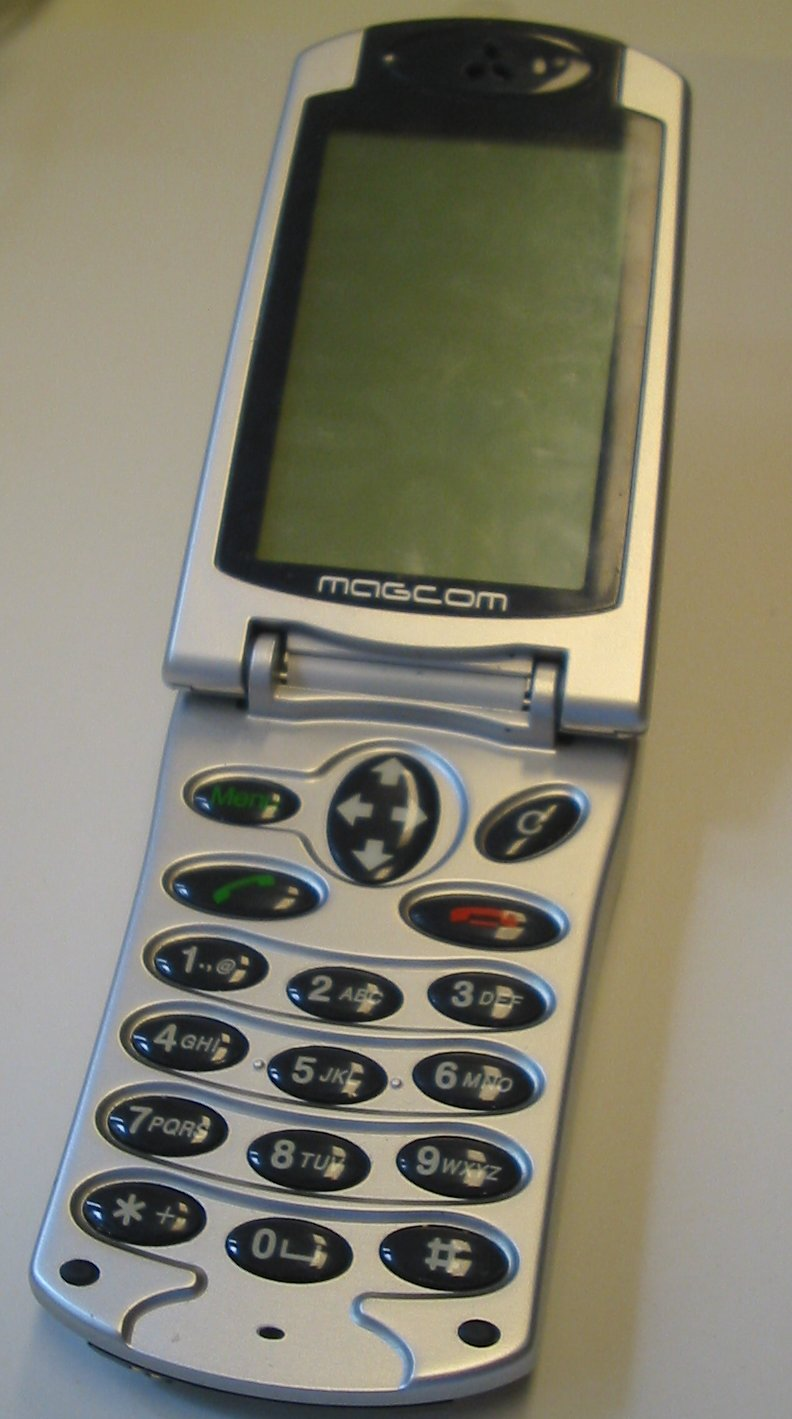 Mobiltelefonen fra Magcom. Odd Arild Olsen